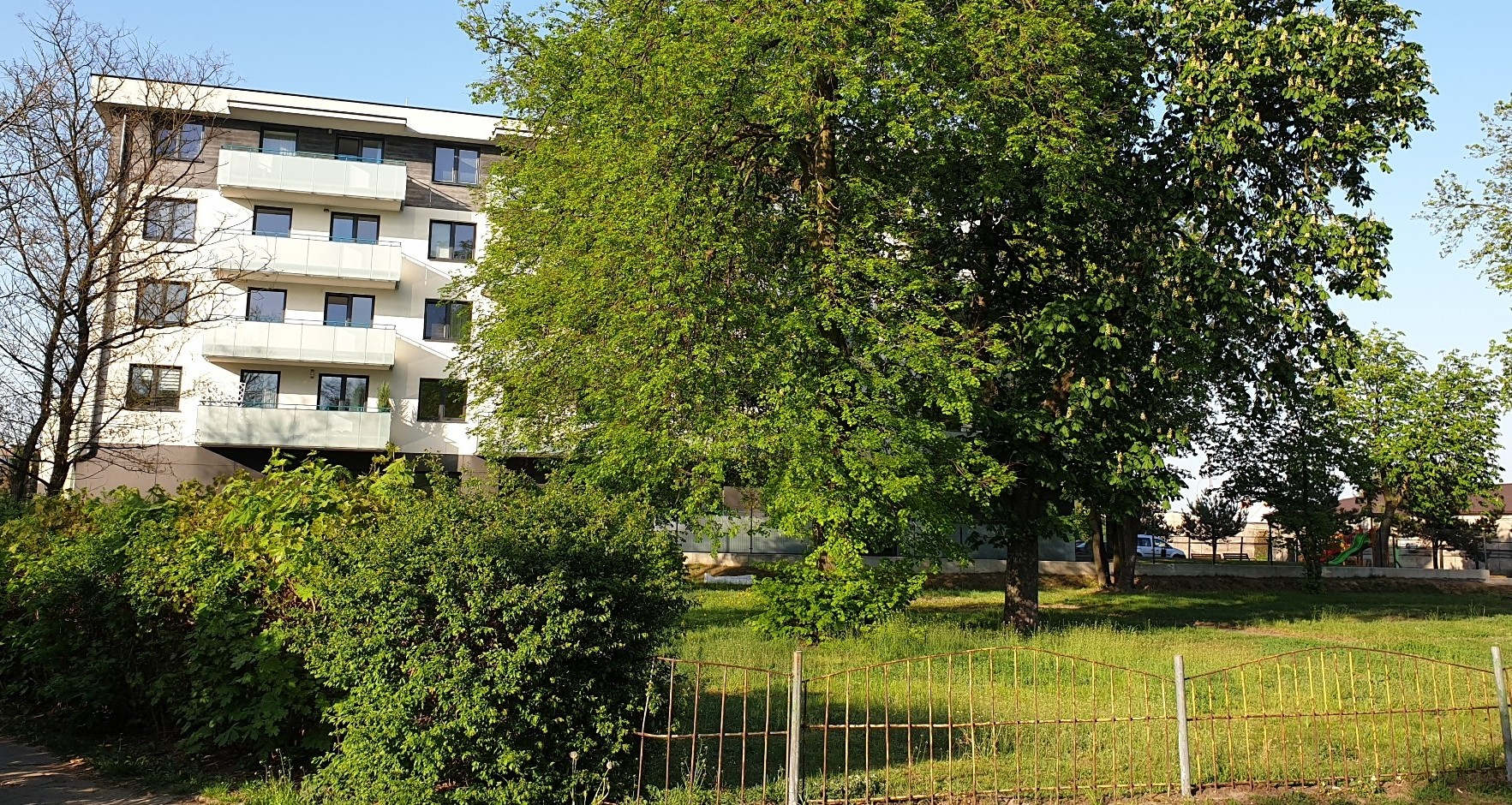 Osiedle wojskowe (2019)